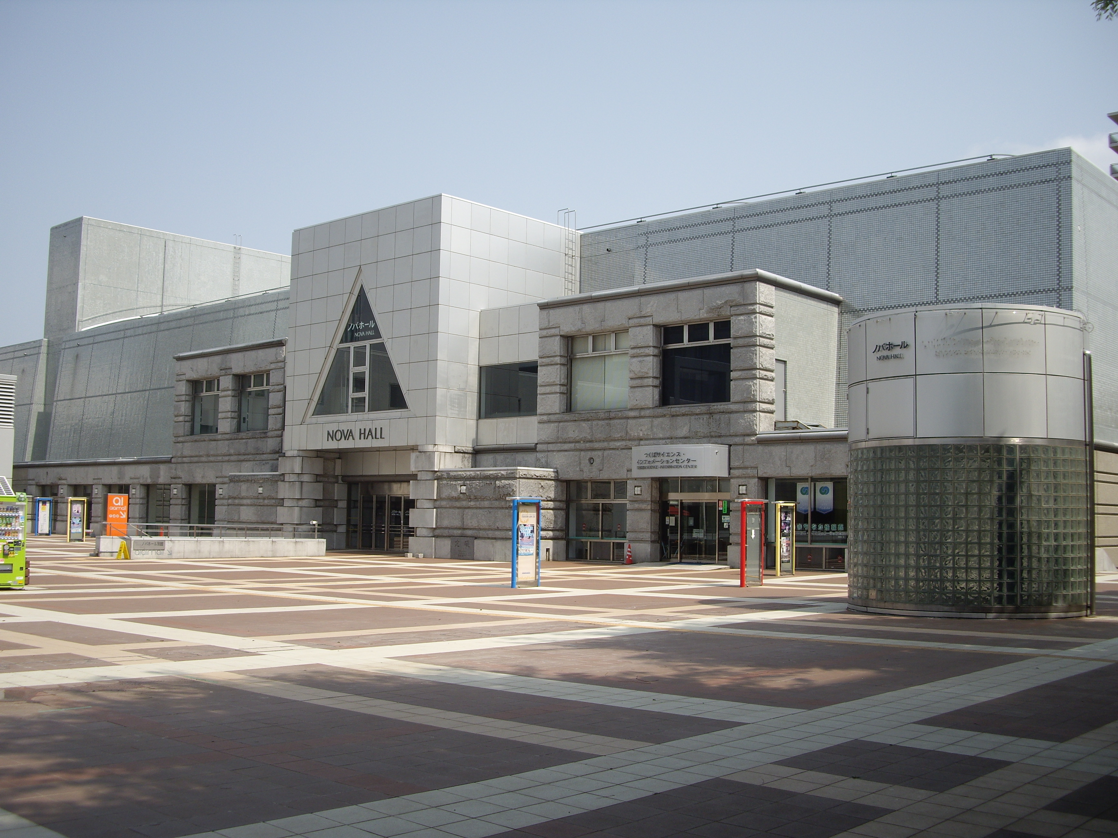 ノバホール（デッキ側）